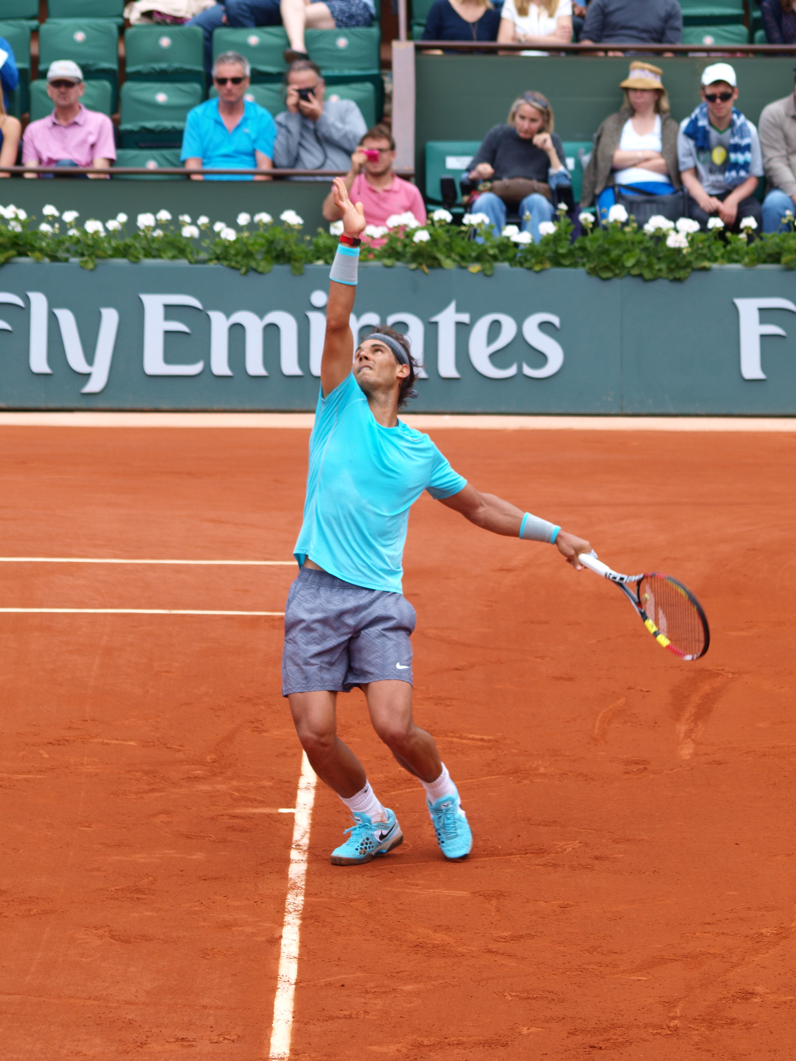 Internationaux de France de tennis, le 2 juin 2014, sur le court Philippe Chatrier : Raphaël Nadal